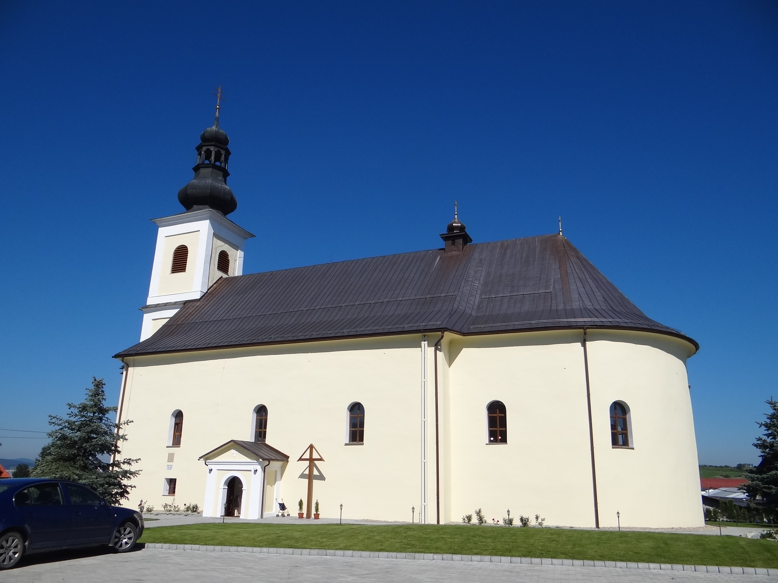 Čimhová kostel (kościół w Czymchowej)